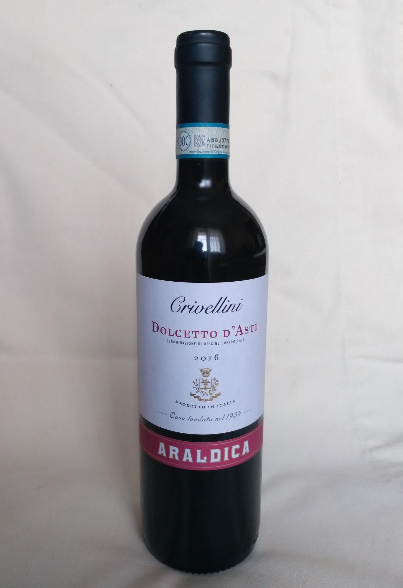 Dolcetto d'Asti